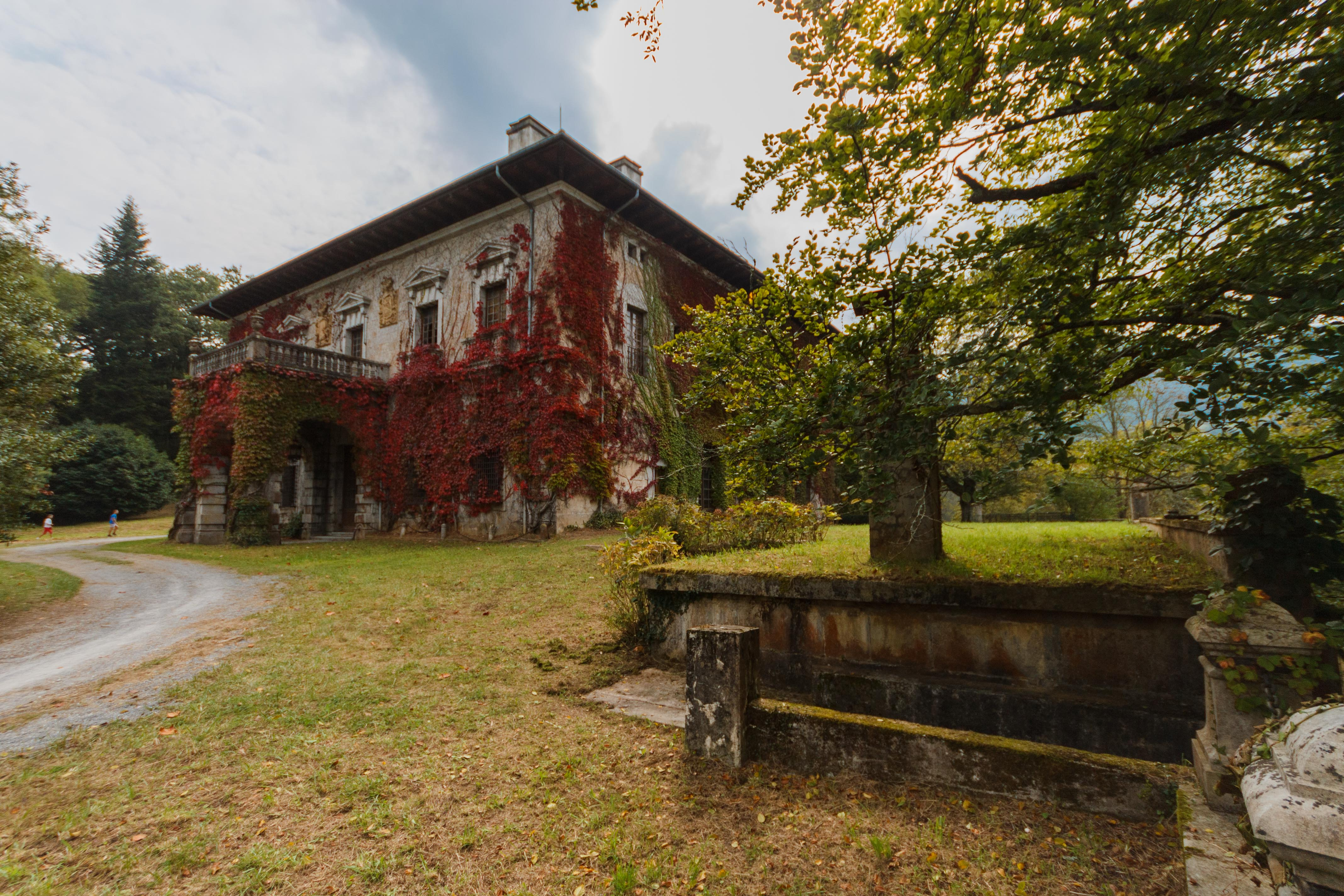 Etxebarria, Palacio Munibe